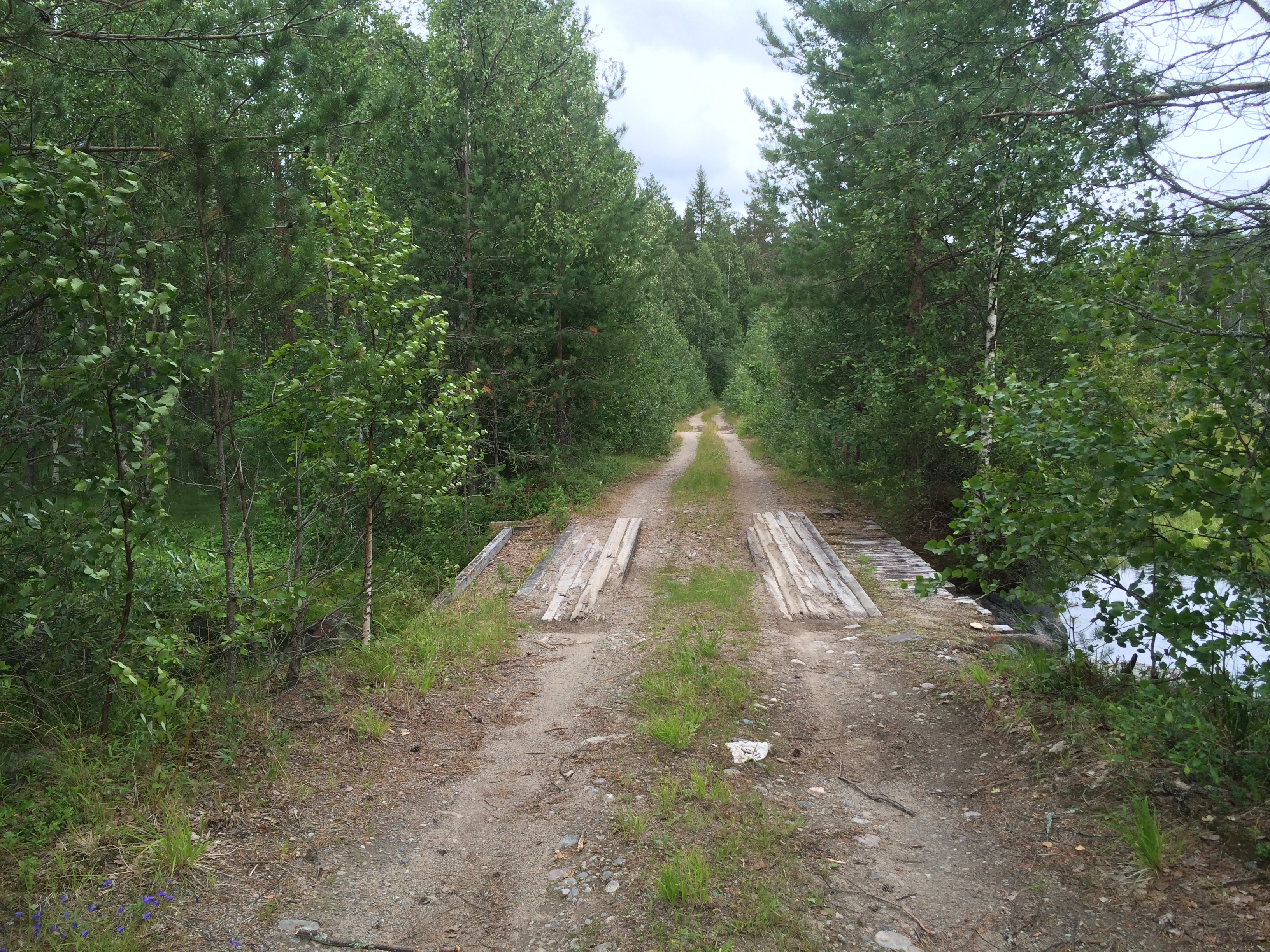 Сяюнейоки